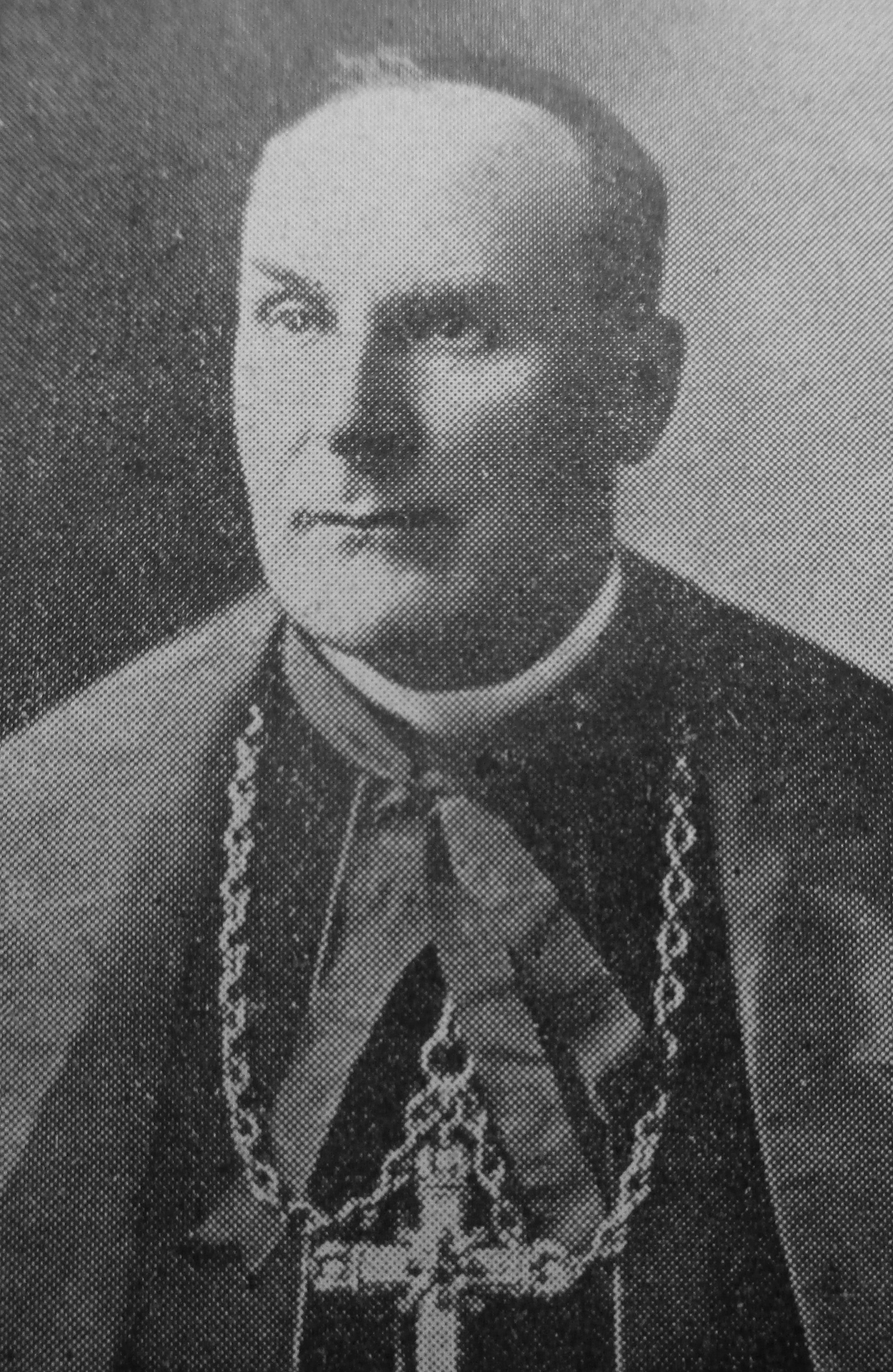 Photographie du cardinal von Faulhaber parue dans L'Illustration, hors série de février 1939, après la mort de Pie XI.